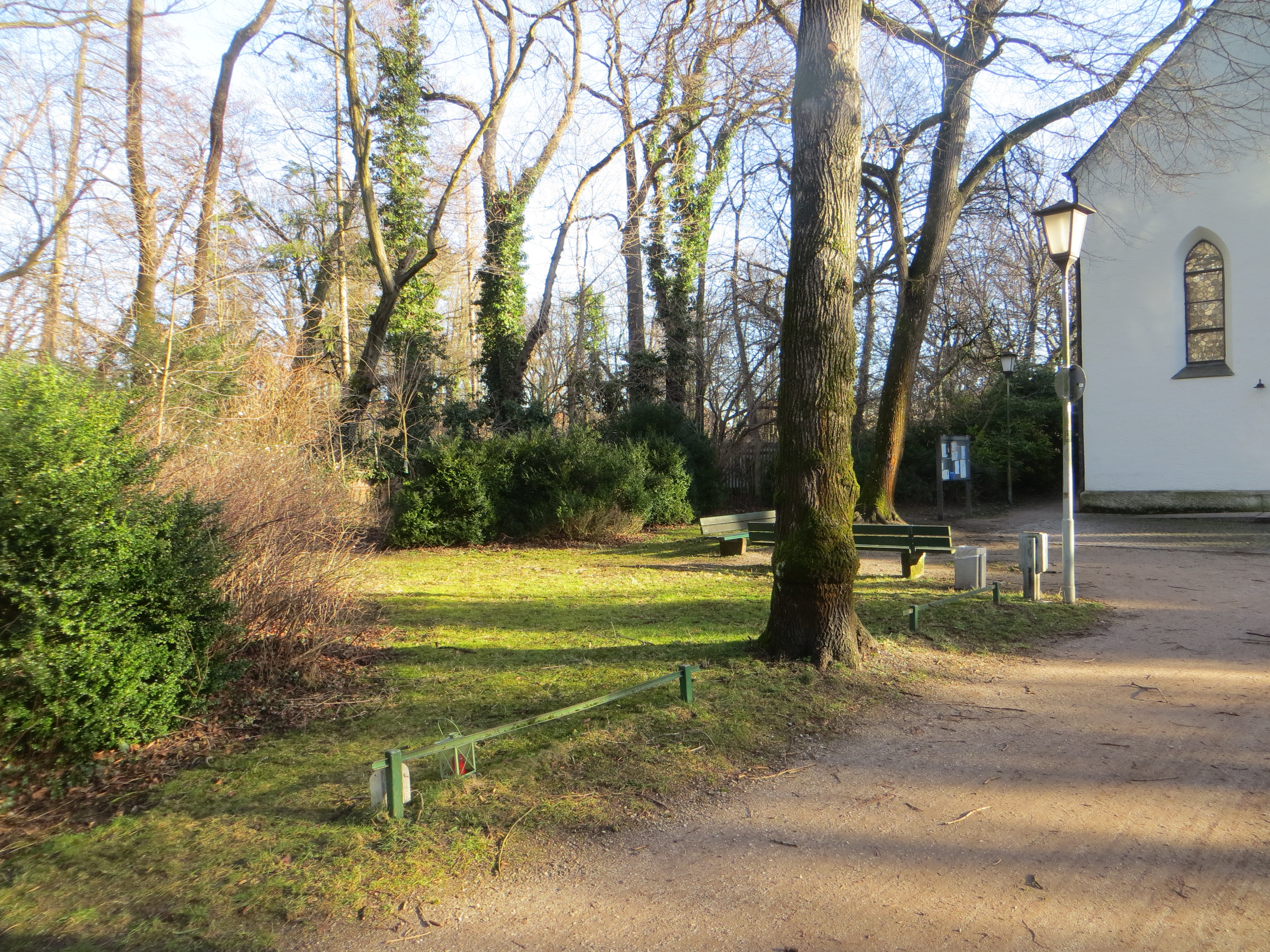 Nordwestlicher Teil des Alten Friedhofs von Pasing